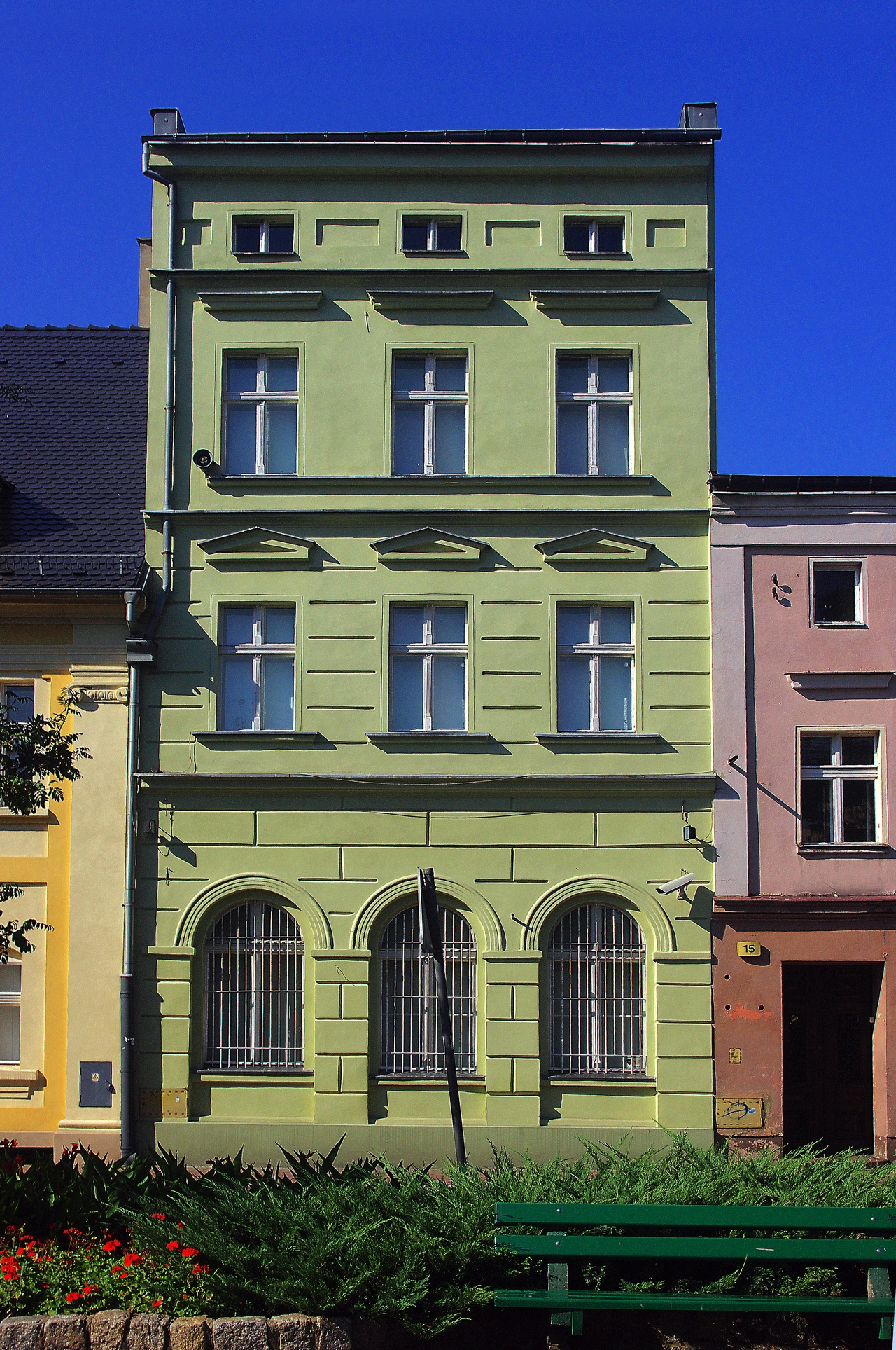 Leszno, Plac Jana Metziga 16 - dom z 1888, obecnie Muzeum Okręgowe (zabytek nr 504/Wlkp/A)